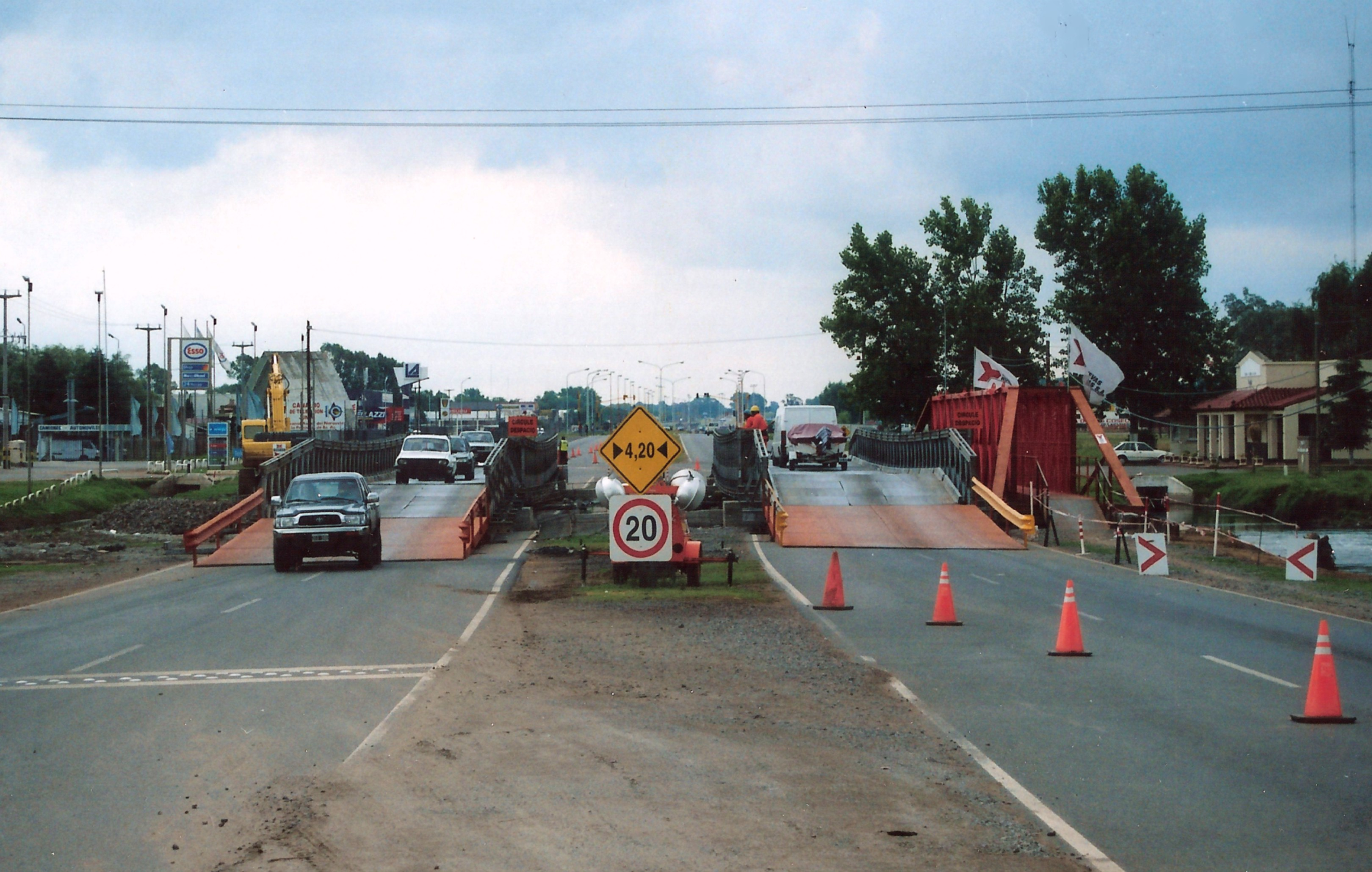 Puentes Bailey instalados en ambas calzadas de la ruta nacional 7 en Junín, Argentina. Los puentes de concreto habían sido seriamente dañados por la crecida del río Salado, durante la inundación de 2001.